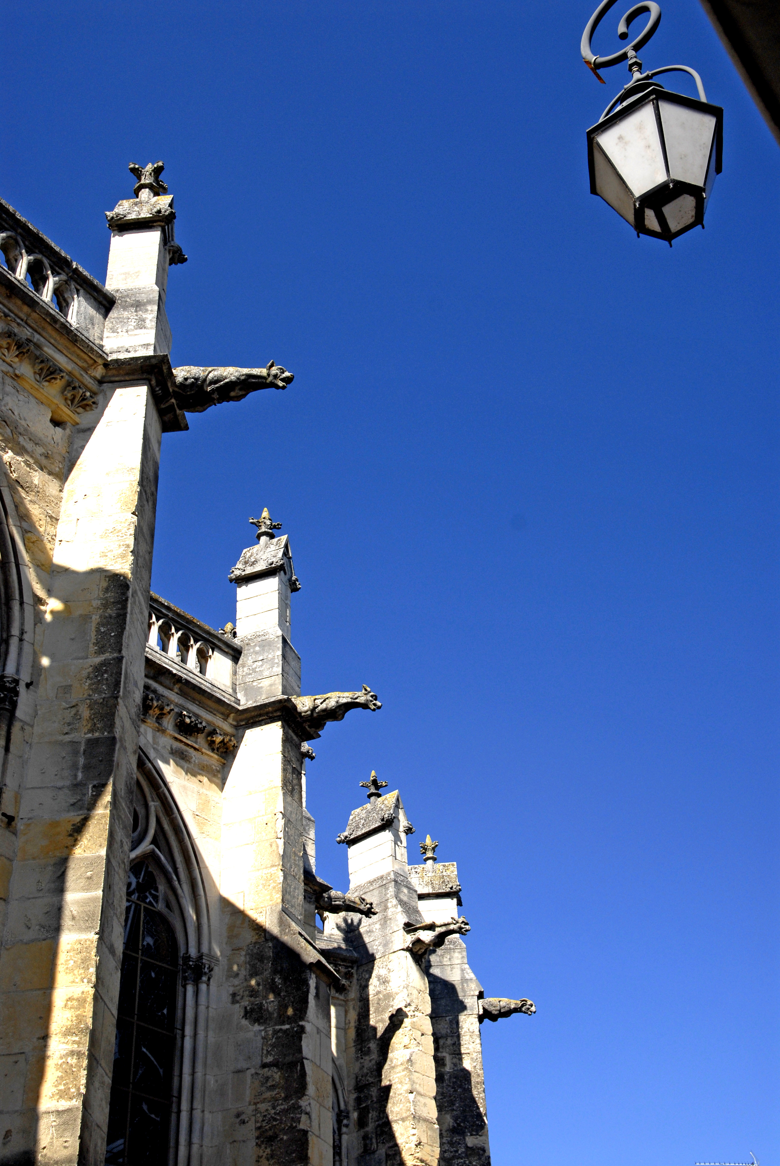 Kathedrale Nevers, Strebepfeiler Kranzkapellen